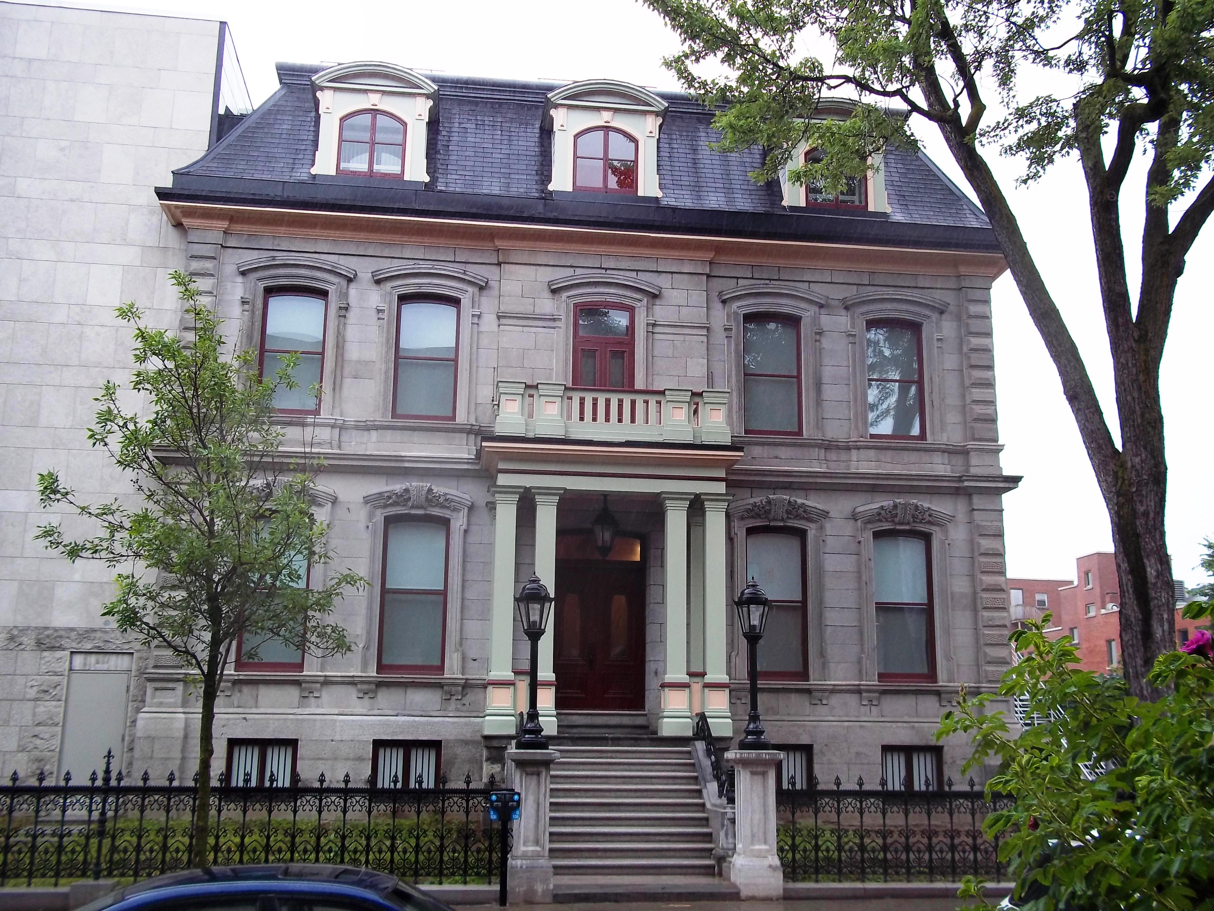 Maison Marie-Hélène-Jodoin, intégrée à l'édifice Gilles-Hocquart, Montréal